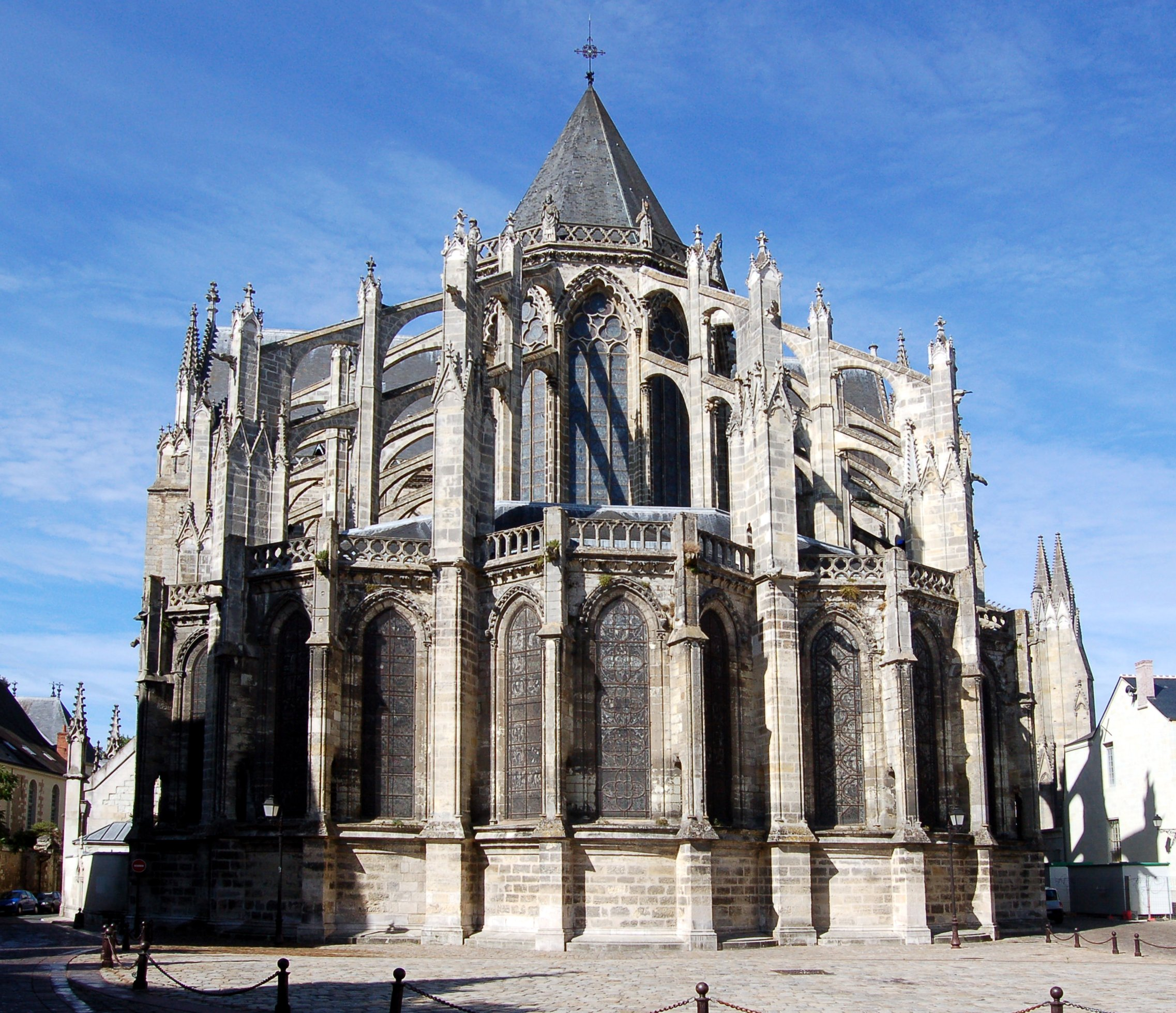 Chor der Kathedrale von Tours